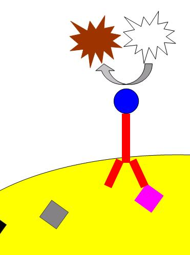 צביעה אימונוהיסטוכימית בעזרת נוגדן מצומד לאנזים HRP